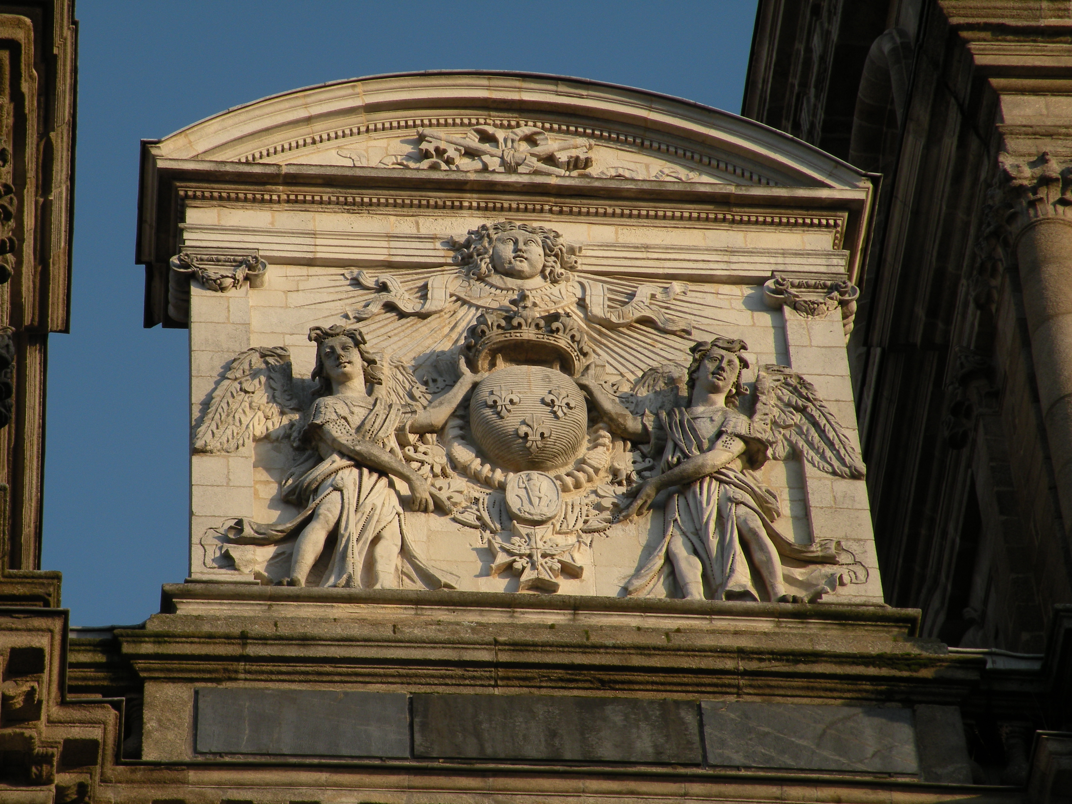 Fronton de la cathédrale Saint-Pierre de Rennes. Il porte l’inscription « Nec Pluribus Impar », devise de Louis XIV de France.